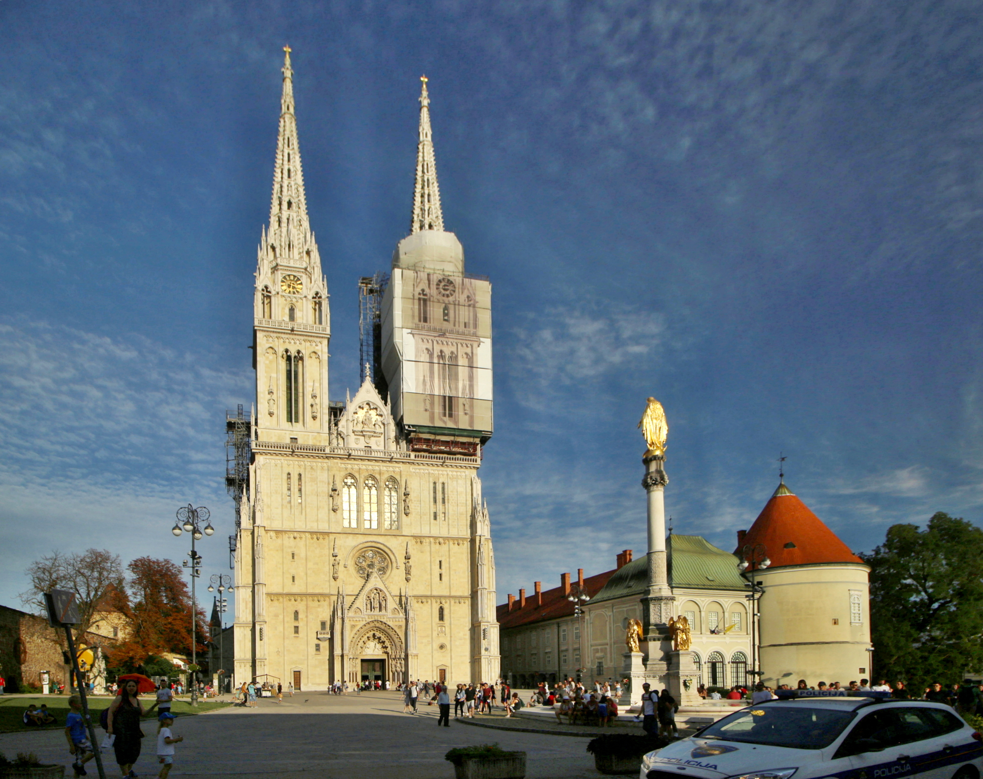 Záhřeb, Kapitol, katedrála a okolí